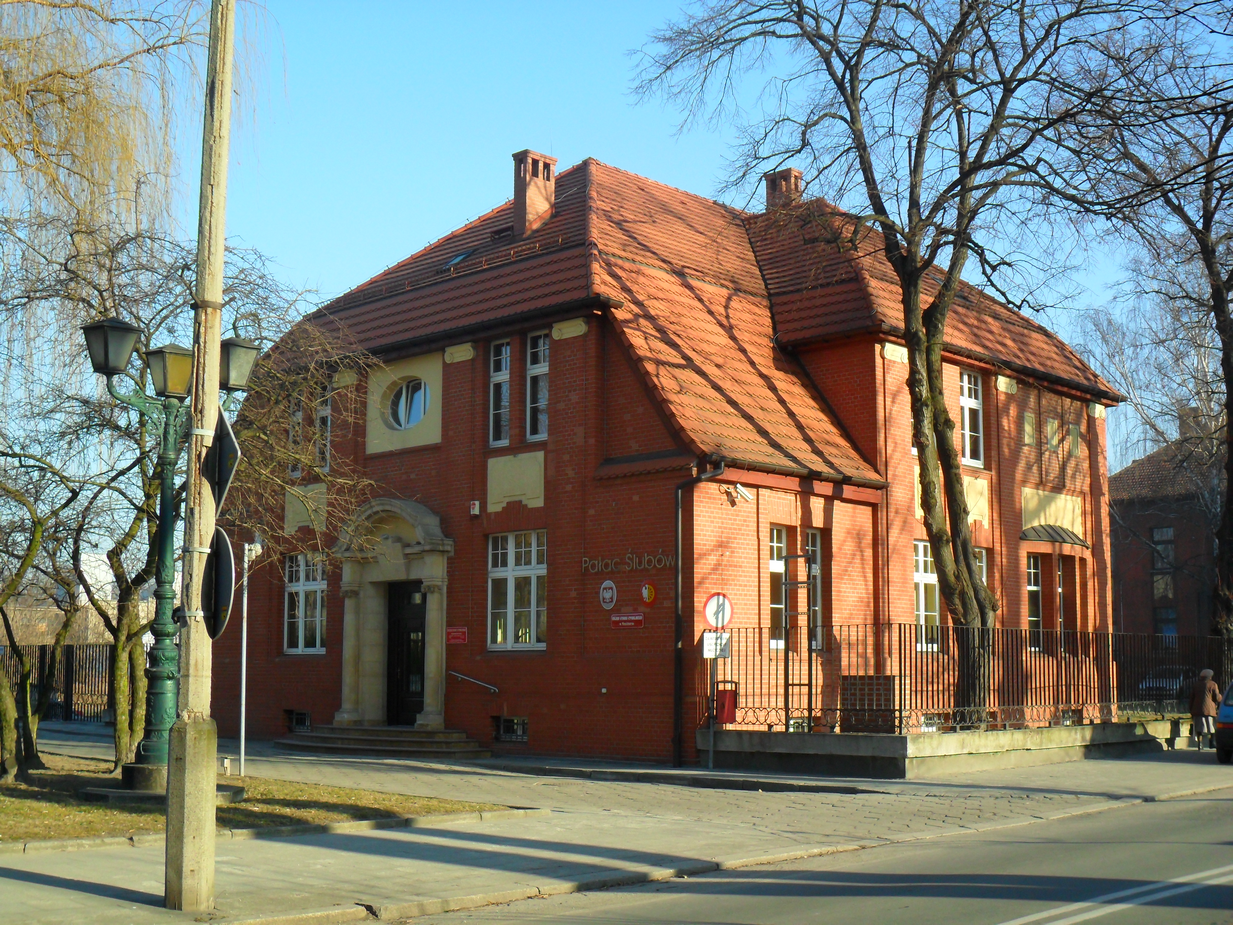 Budynek Urzędu Stanu Cywilnego w Raciborzu.